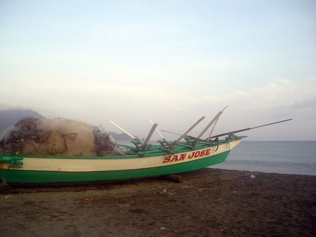 Claveria, Cagayan, Philippines